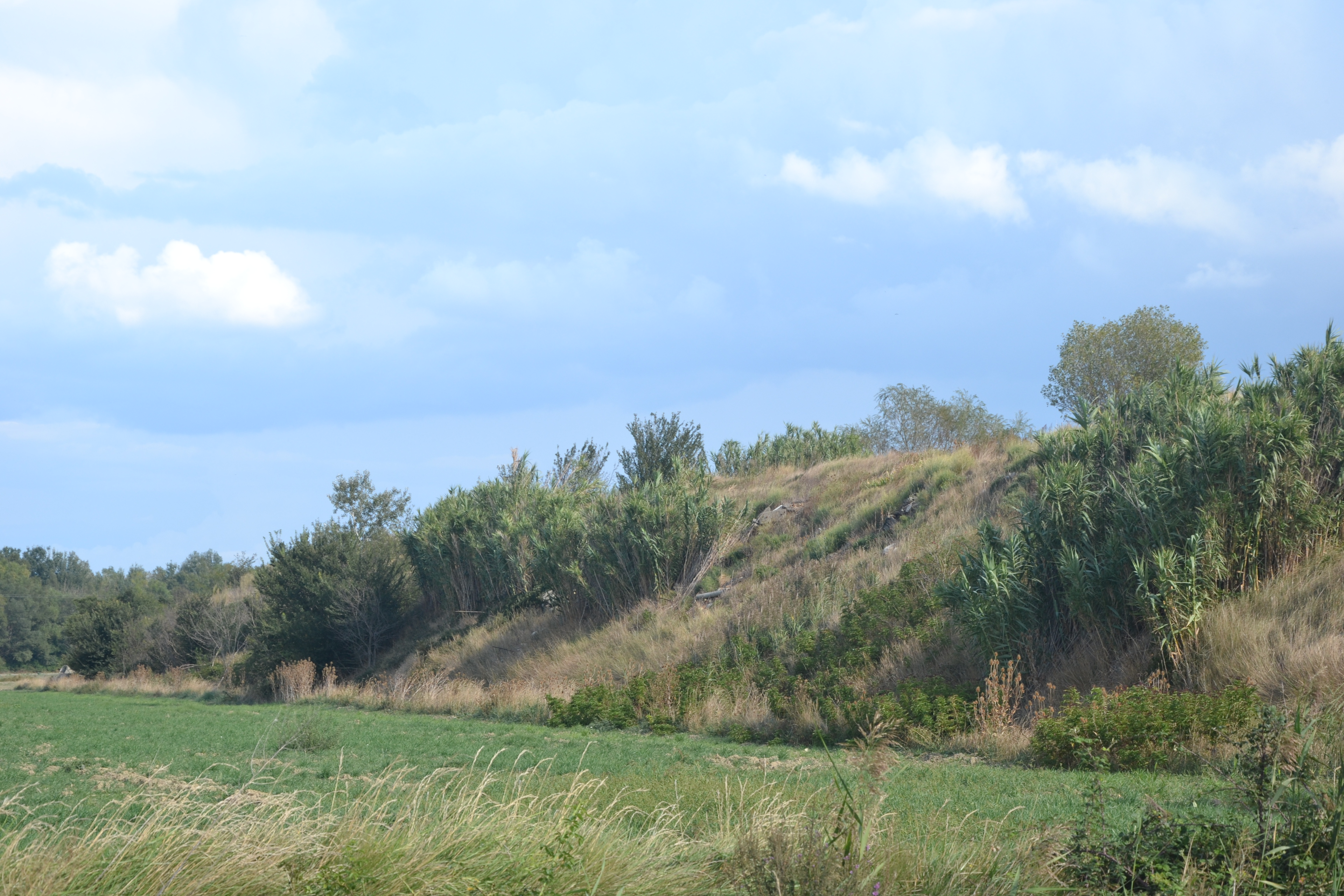 talus des boues et déchets récupérés de l'Ouvèze, à la suite des inondations de l'Ouvèze de Septembre 1992